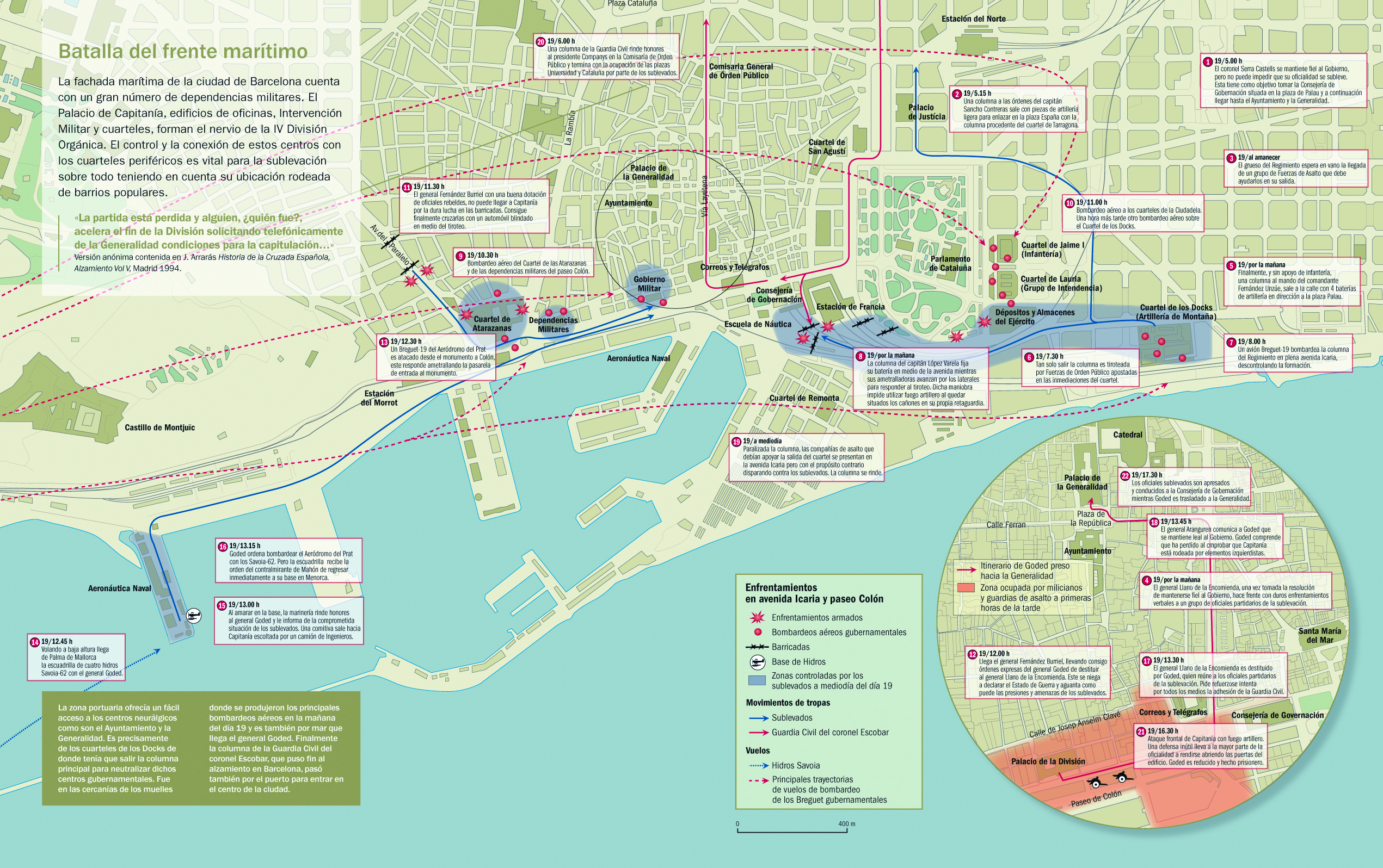 Infografía que narra los combates en Barcelona durante el 19 de julio de 1936. Páginas 56, y 57 del libro "La sublevación", de Víctor Hurtado (DAU, 2011).